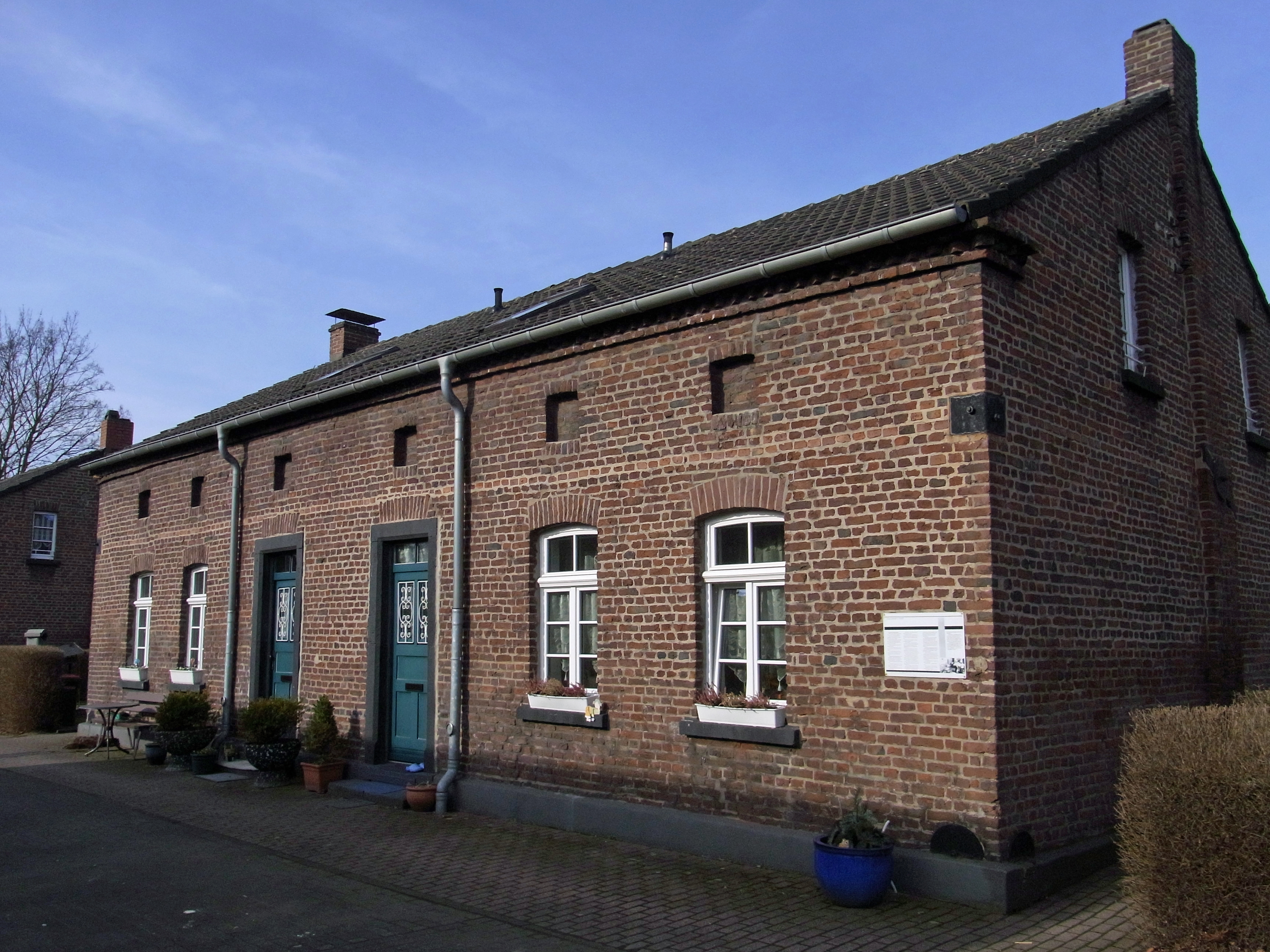 Siedlung Eisenheim